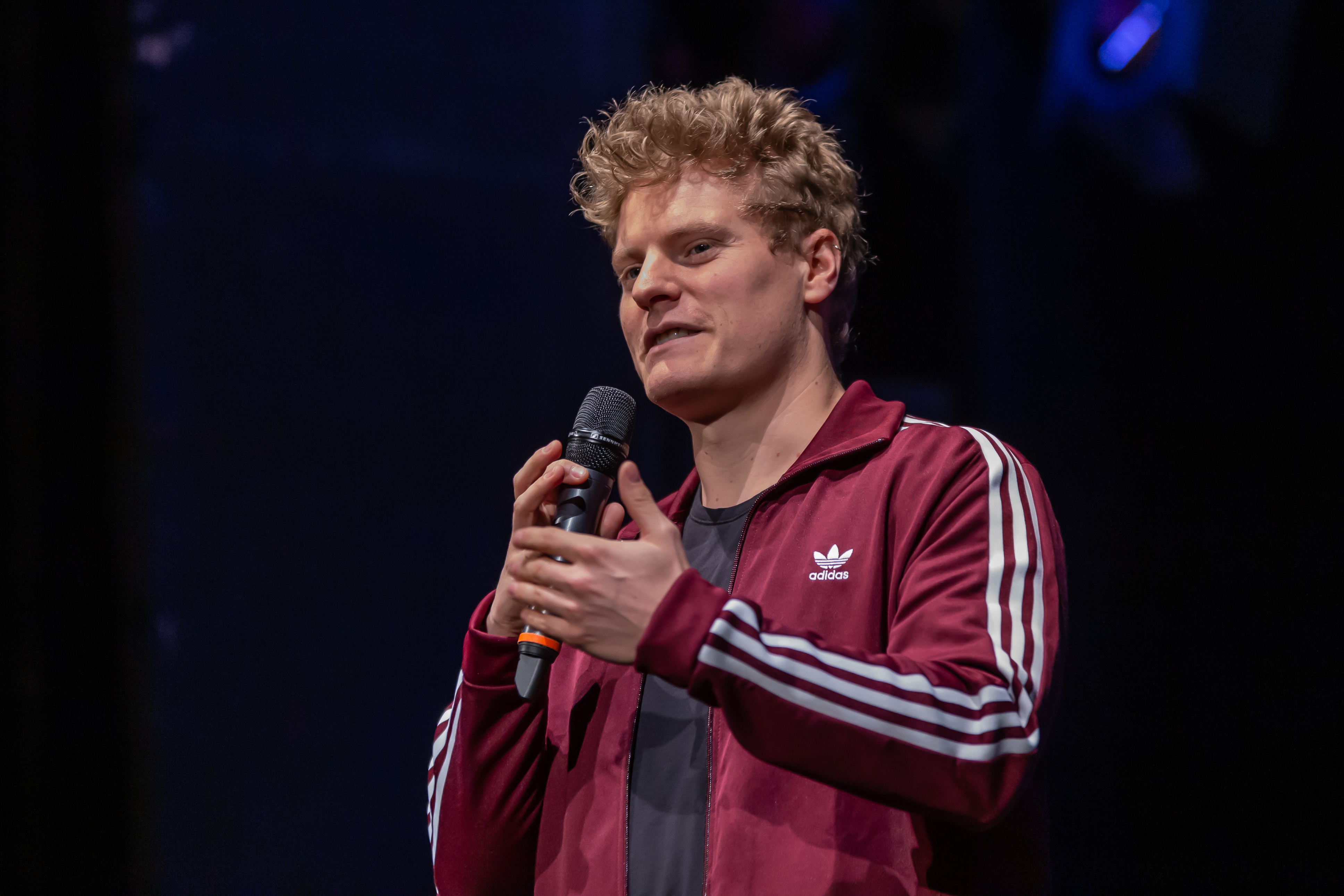 Thomas Spitzer in der Alten Oper in Erfurt